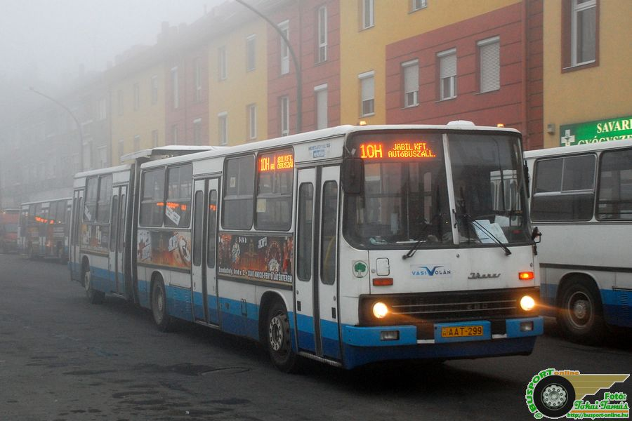 10H busz a szombathelyi vasútállomáson, Éhen Gyula tér